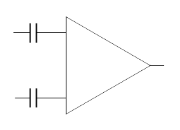 Potentialfreie Übertragung mit kapazitiver Kopplung